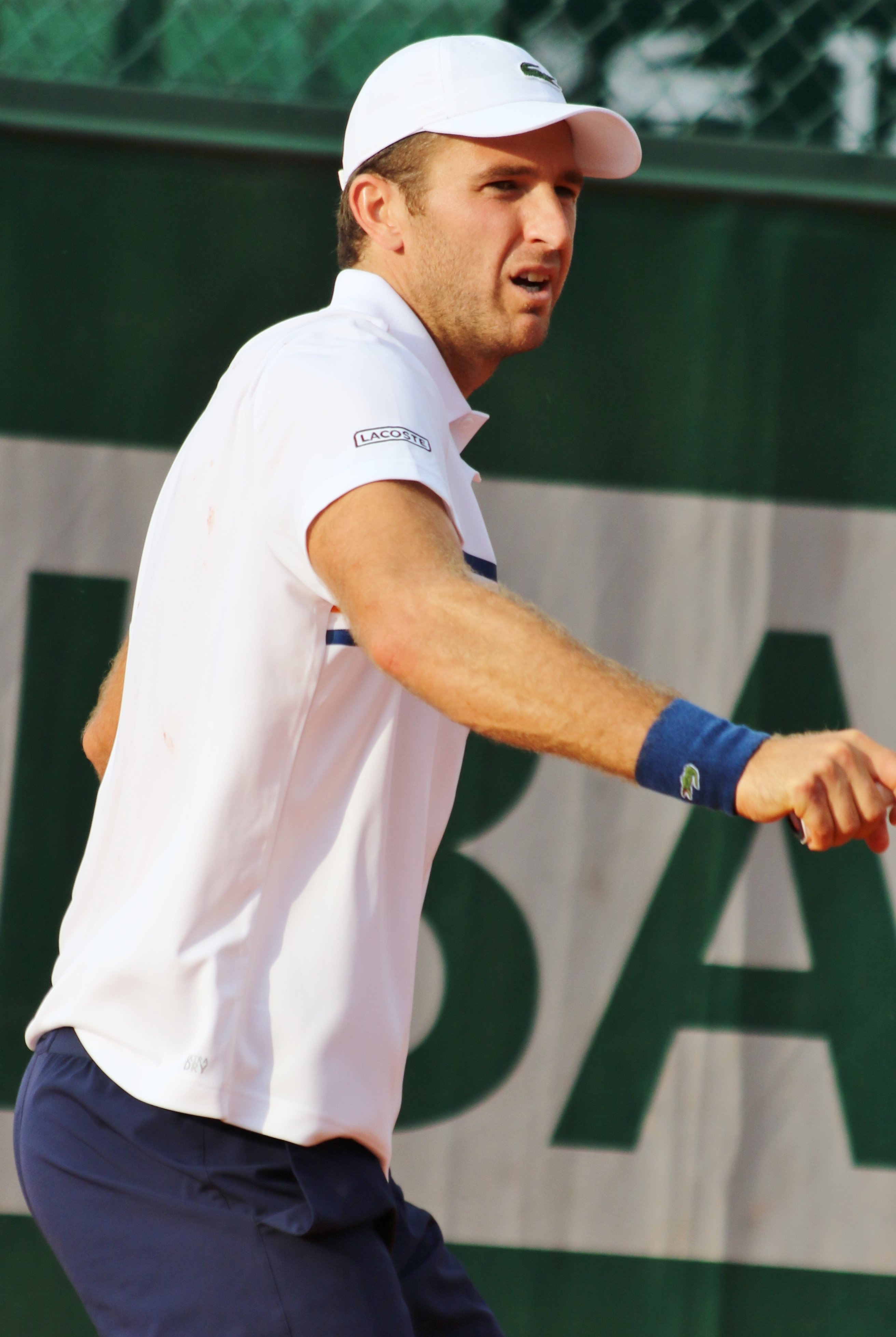 Martin F. RG18 (10)